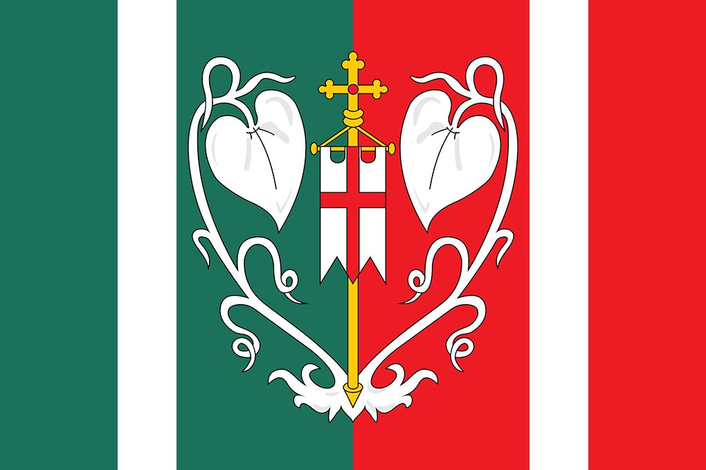 vlajka, Pěčín , okres Rychnov nad Kněžnou